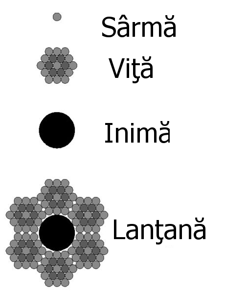 Diagrama unei parâme metalice 6x19.